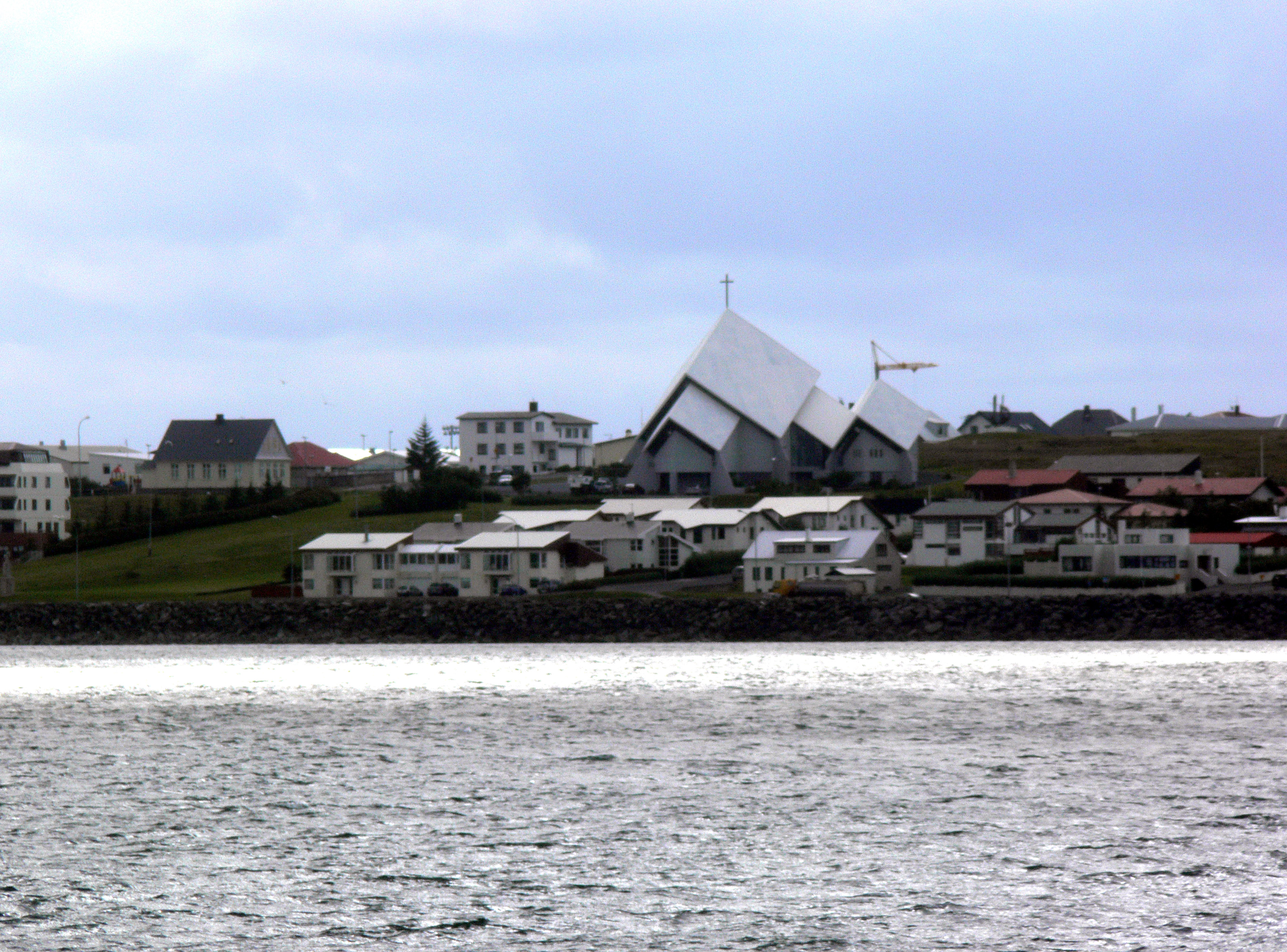 Kirche von Seltjarnarnes